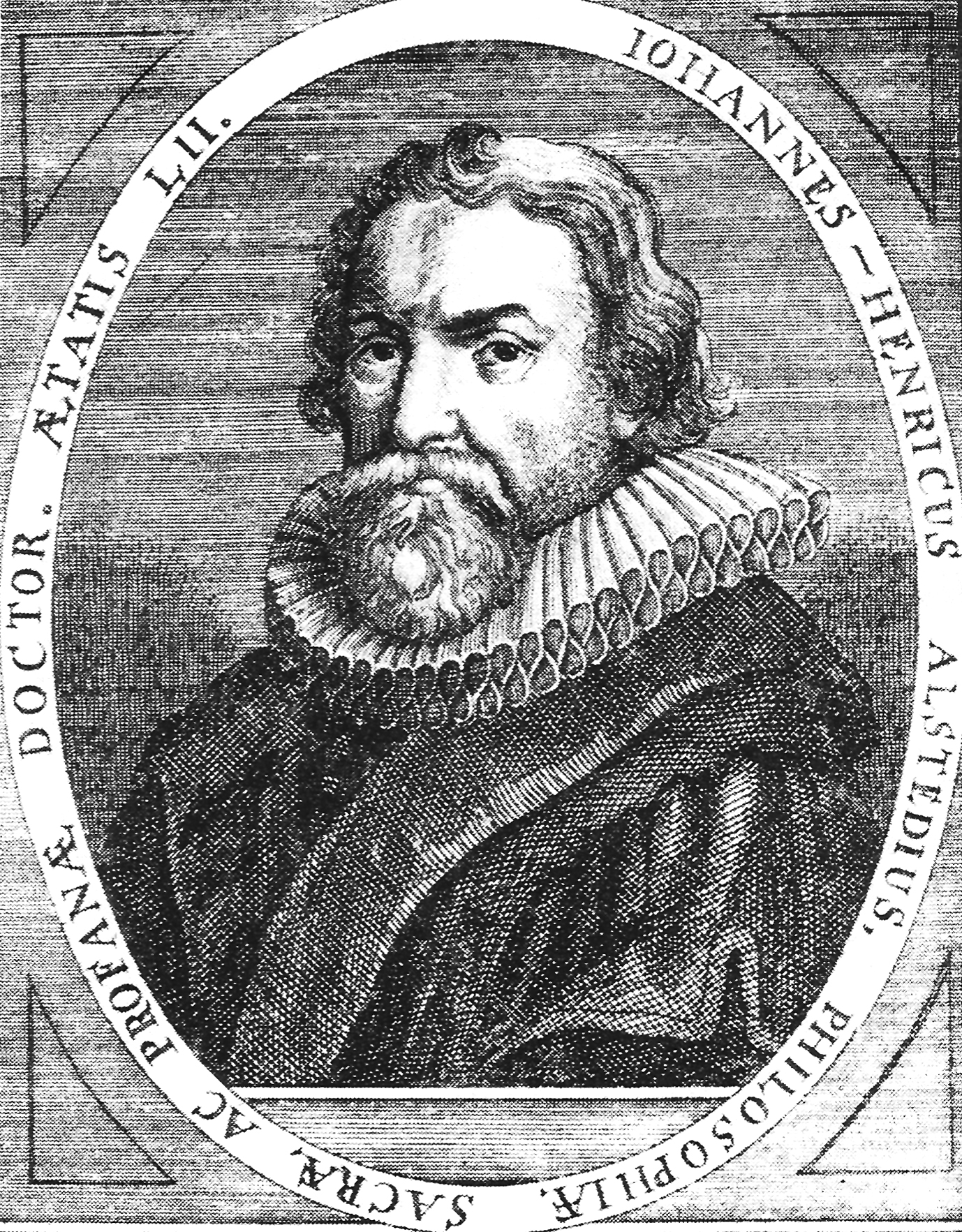 Johann Heinrich Alsted (Kupferstich)